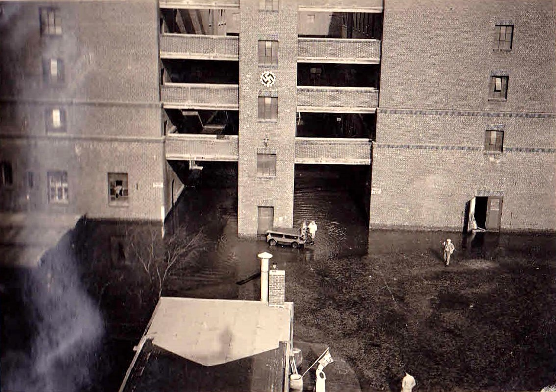 Gebäude der Konsummühle in Magdeburg-Industriehafen, Klosterkamp 4 (als Begleittext an der Aufnahme steht irreführend lediglich „Holland“), möglicherweise März 1940, Werkgebäude mit Hakenkreuz, im unteren Bereich steht Wasser, vermutlich vom Elbehochwasser März 1940